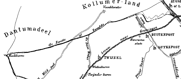 Fragment kaart Achtkarspelen (met de Swadde, Zwette of Zwadde